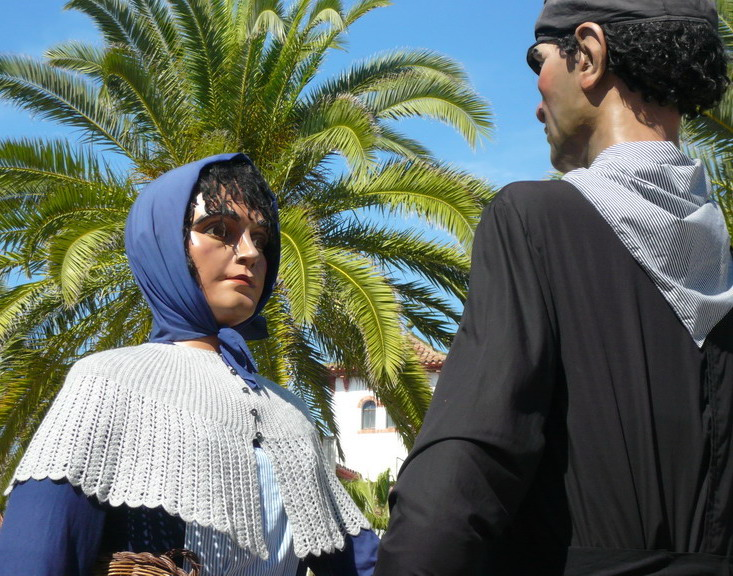 Els gegants de Salou, Ramon i Maria del Mar, al passeig Jaume I de Salou